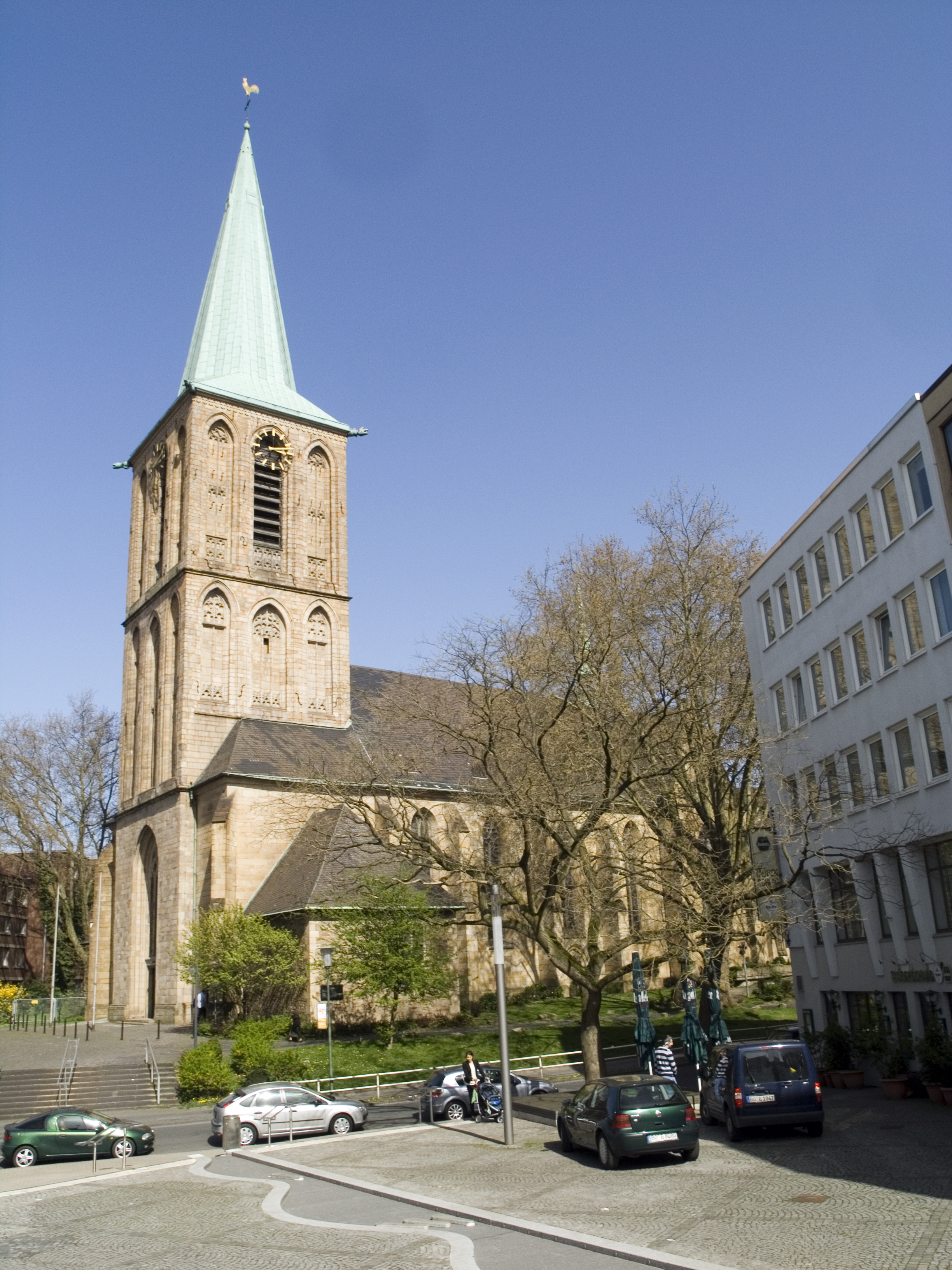 Северный Рейн - Вестфалия, Бохум - церковь Петра и Павла